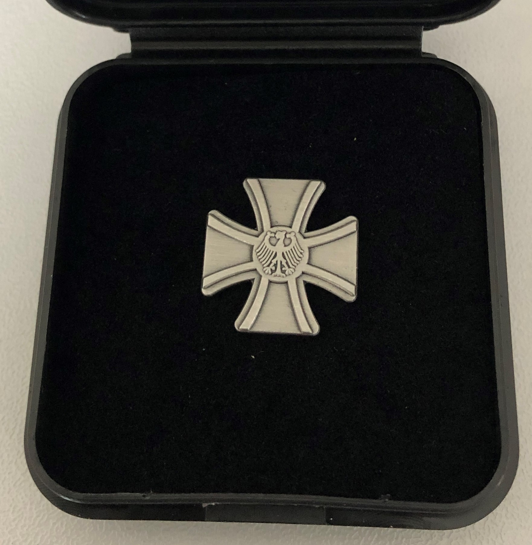 Veteranenabzeichen der Bundeswehr in der "Verleihungsbox"